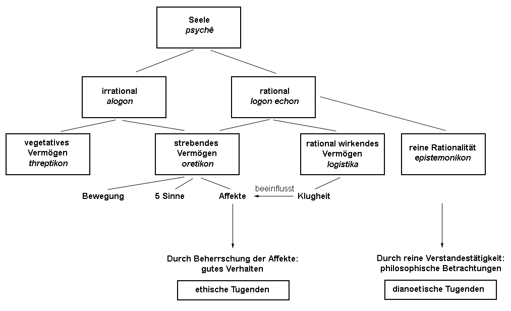 Schaubild Seele aus der Nikomachischen Ethik